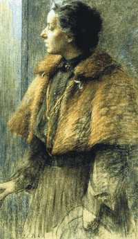 Self-portrait